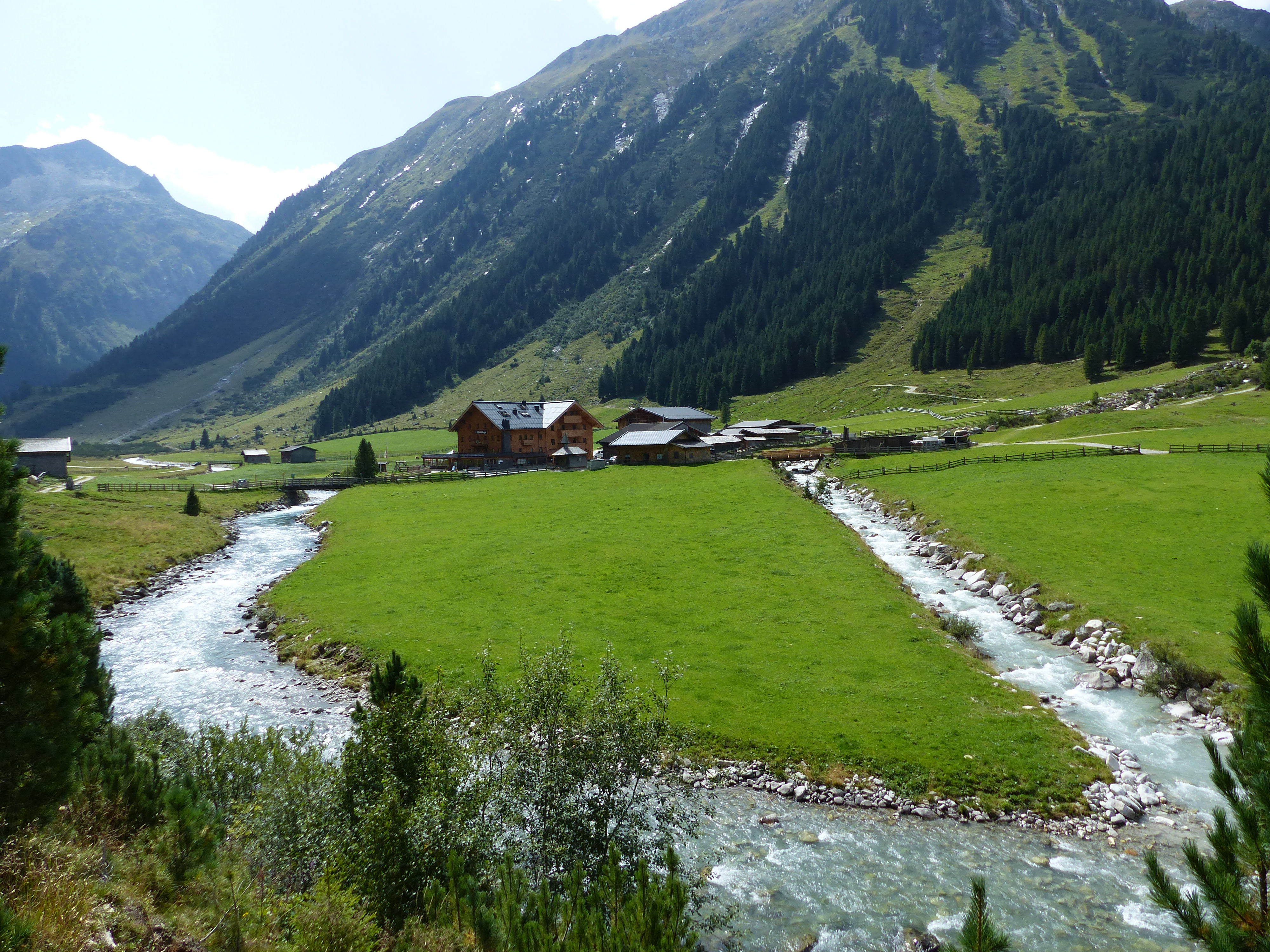 Krimmler Tauernhaus mit Krimmler Ache (links) und Rainbach (rechts)